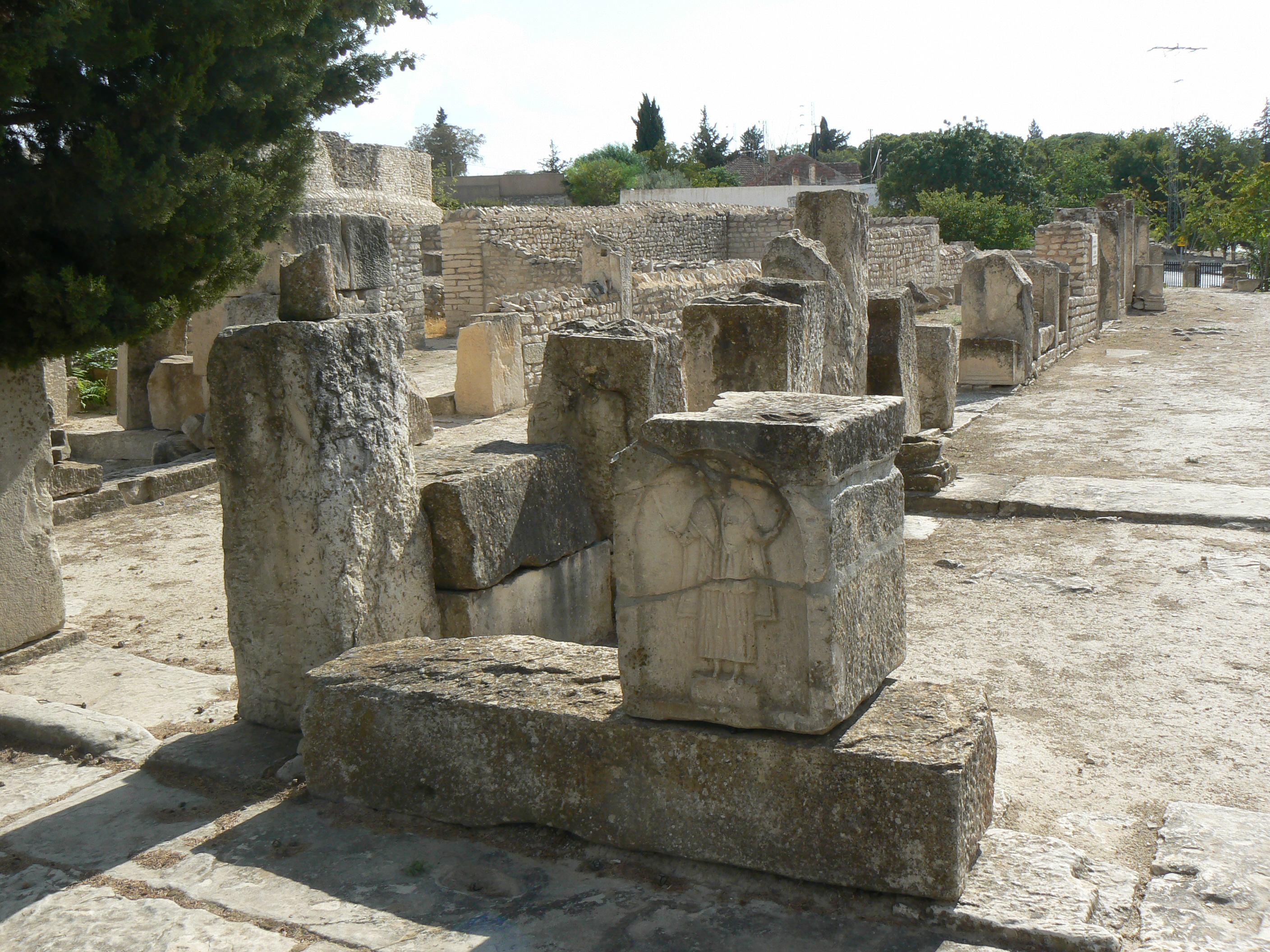 Basilique de Rutilius, annexes vers l'amphithéâtre, derrière le musée de Makthar